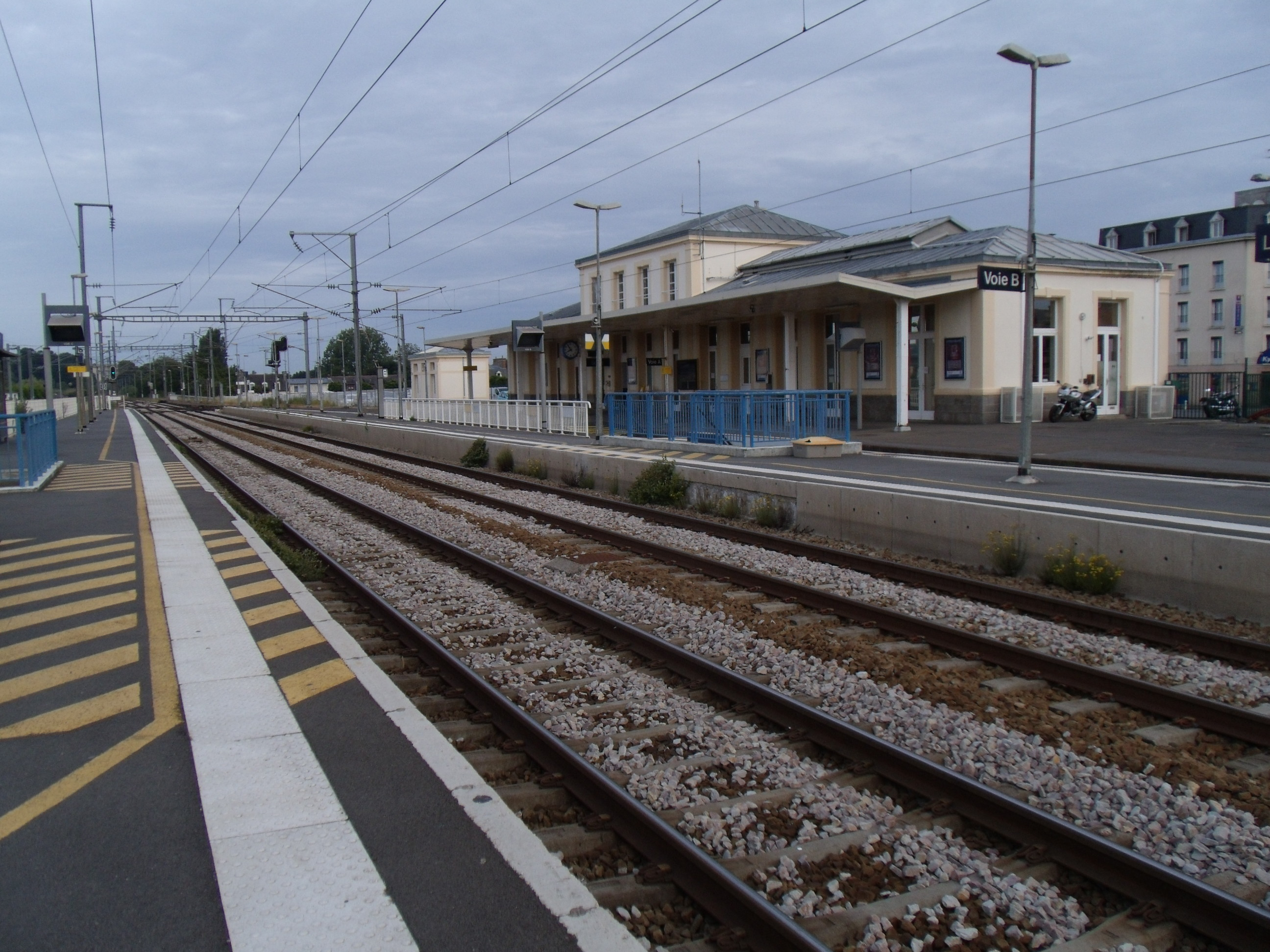 Le bâtiment voyageurs de la gare de Lamballe vu coté voies